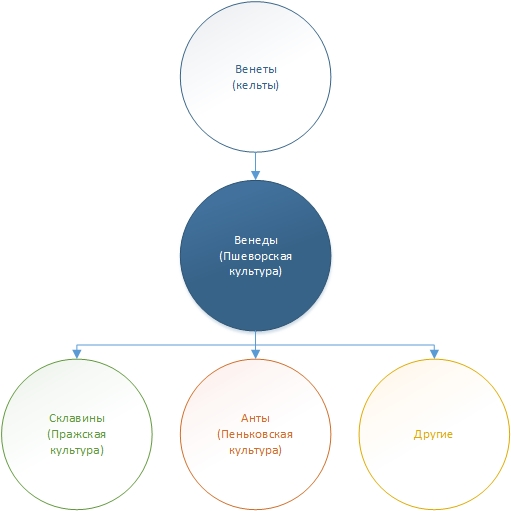 (Вторая гипотеза) Схема взаимоотношений между венедами, антами и склавенами. Кельтский этноним «венеты» был перенесён сперва на пшеворцев, а затем на славян.